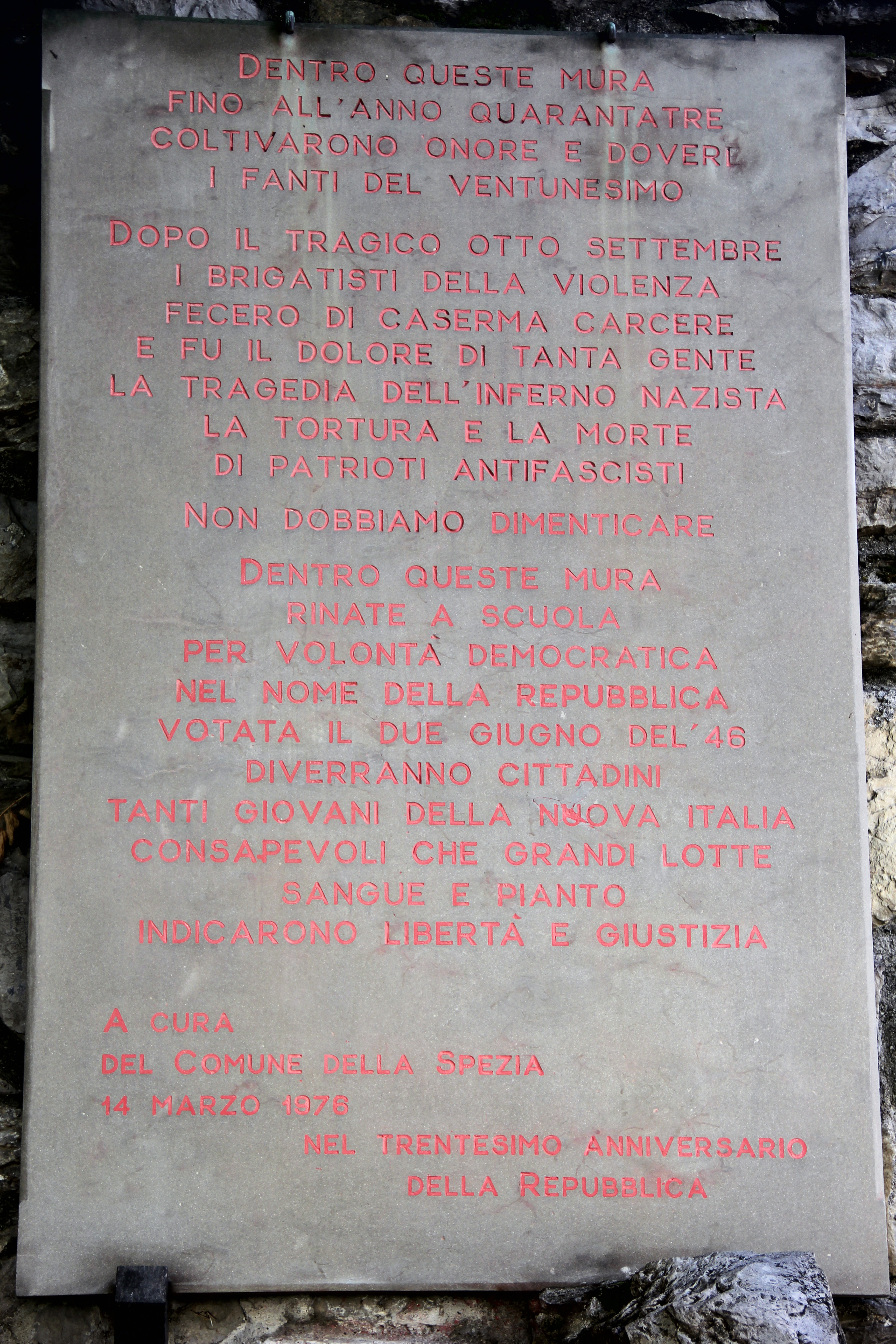 La lapide è posta con lo scopo di mantenere viva la memoria di quanto avvenne nella "Caserma XXI° Reggimento di Fanteria" divenuta prigione fascista dopo l'8 settembre 1943. La targa è stata apposta nel 1976 a conclusione dei lavori per la riconversione dello spazio della Caserma in complesso scolastico, denominato, come il parco in cui è contenuto, "2 Giugno".